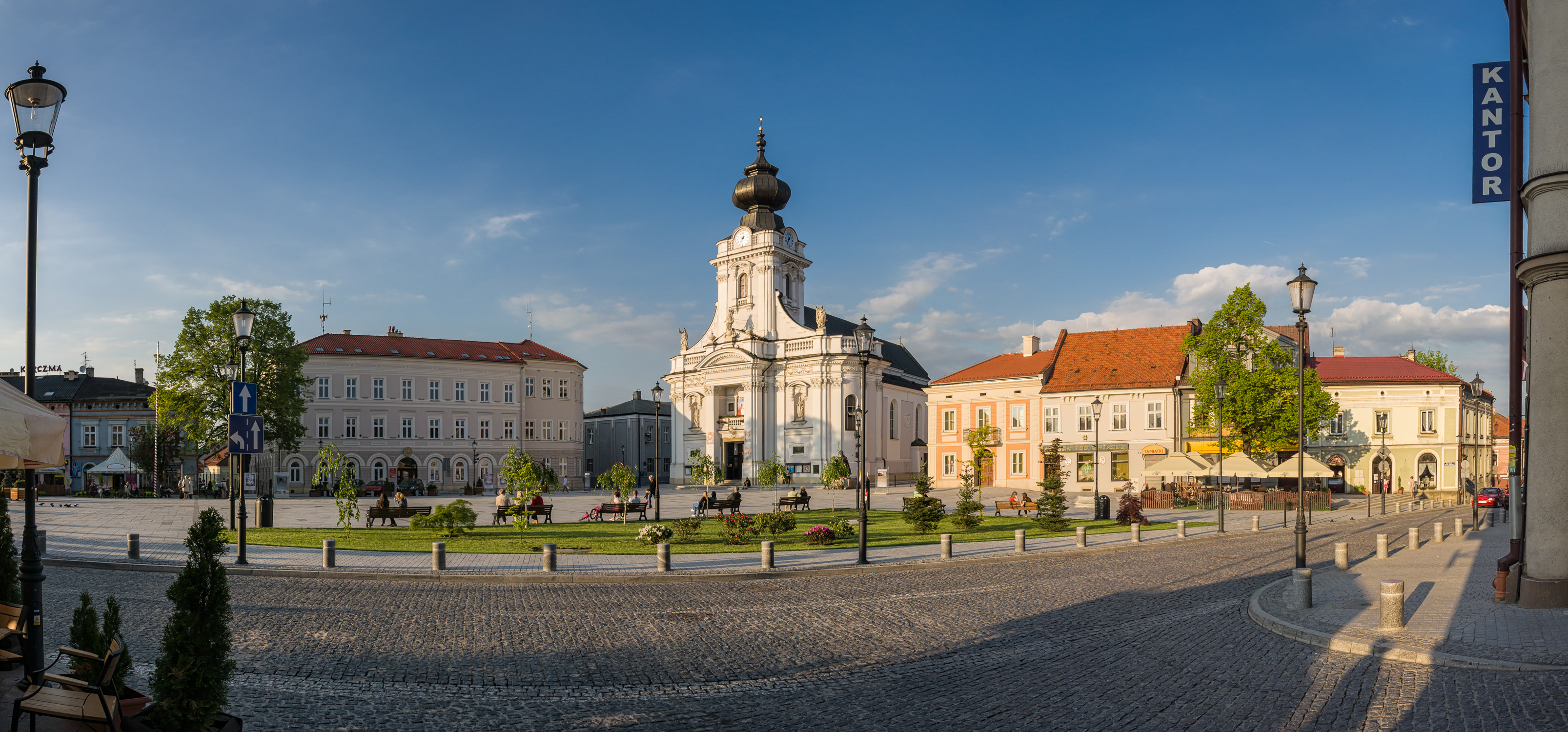 Wadowicki rynek